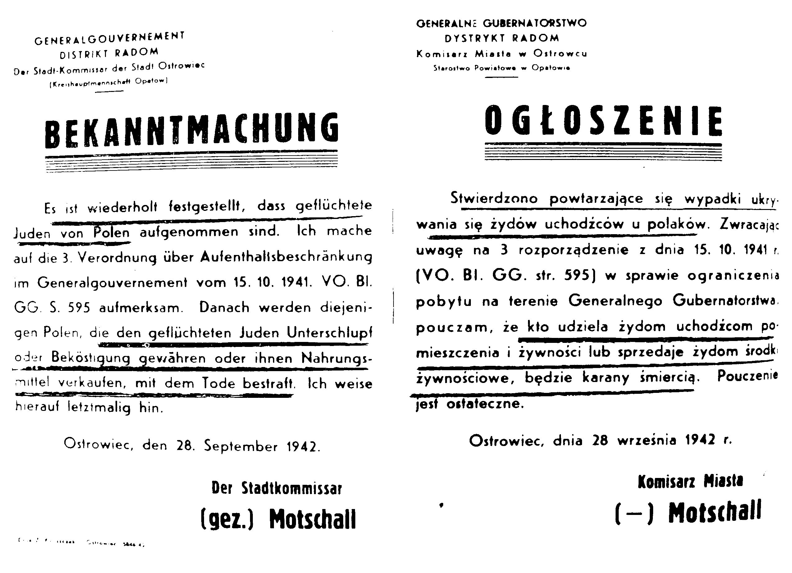 Bekanntmachung Matschall Ostrowiec 28 września 1942.